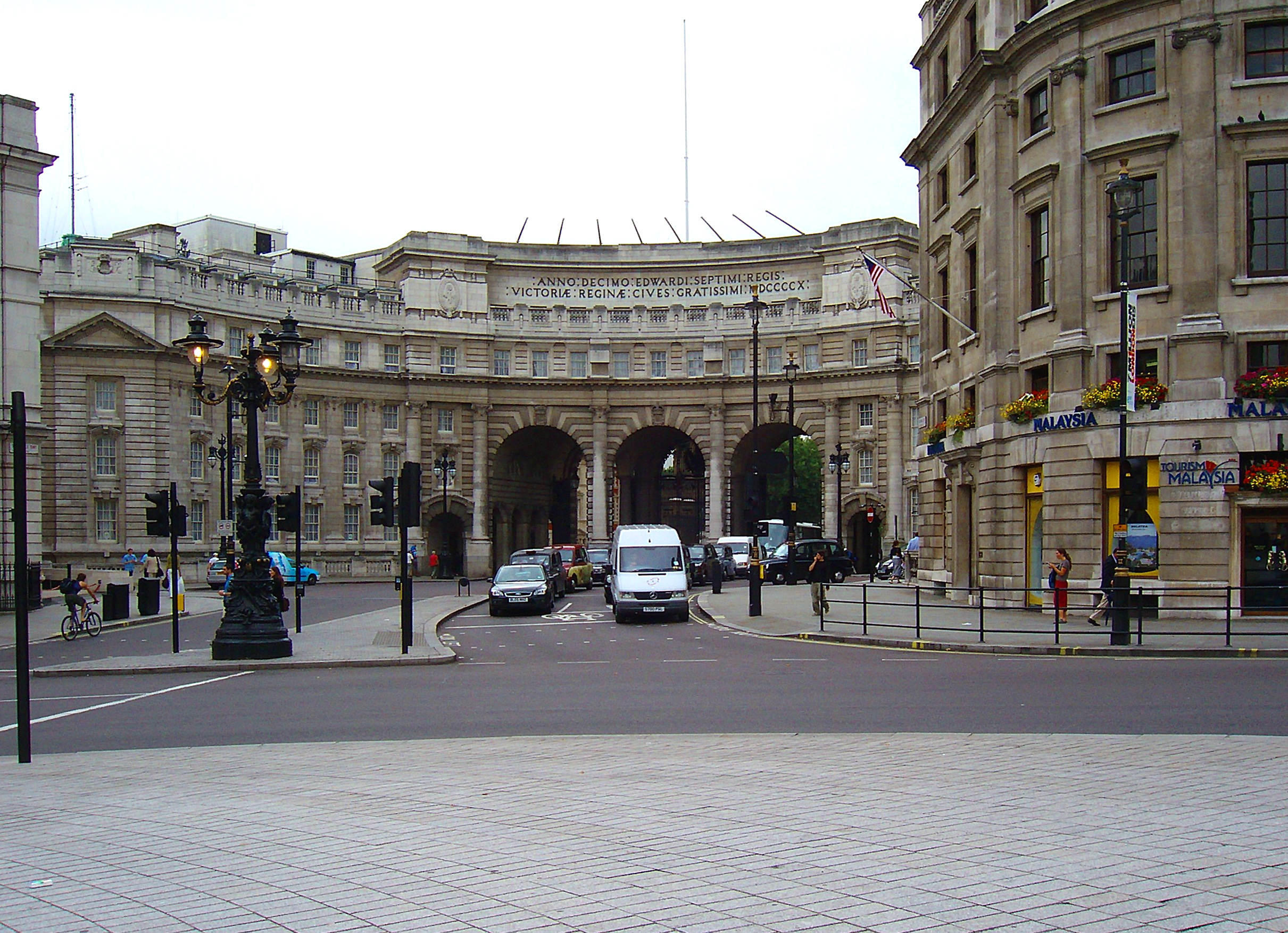 Admiralty Arch in London/Großbritannien